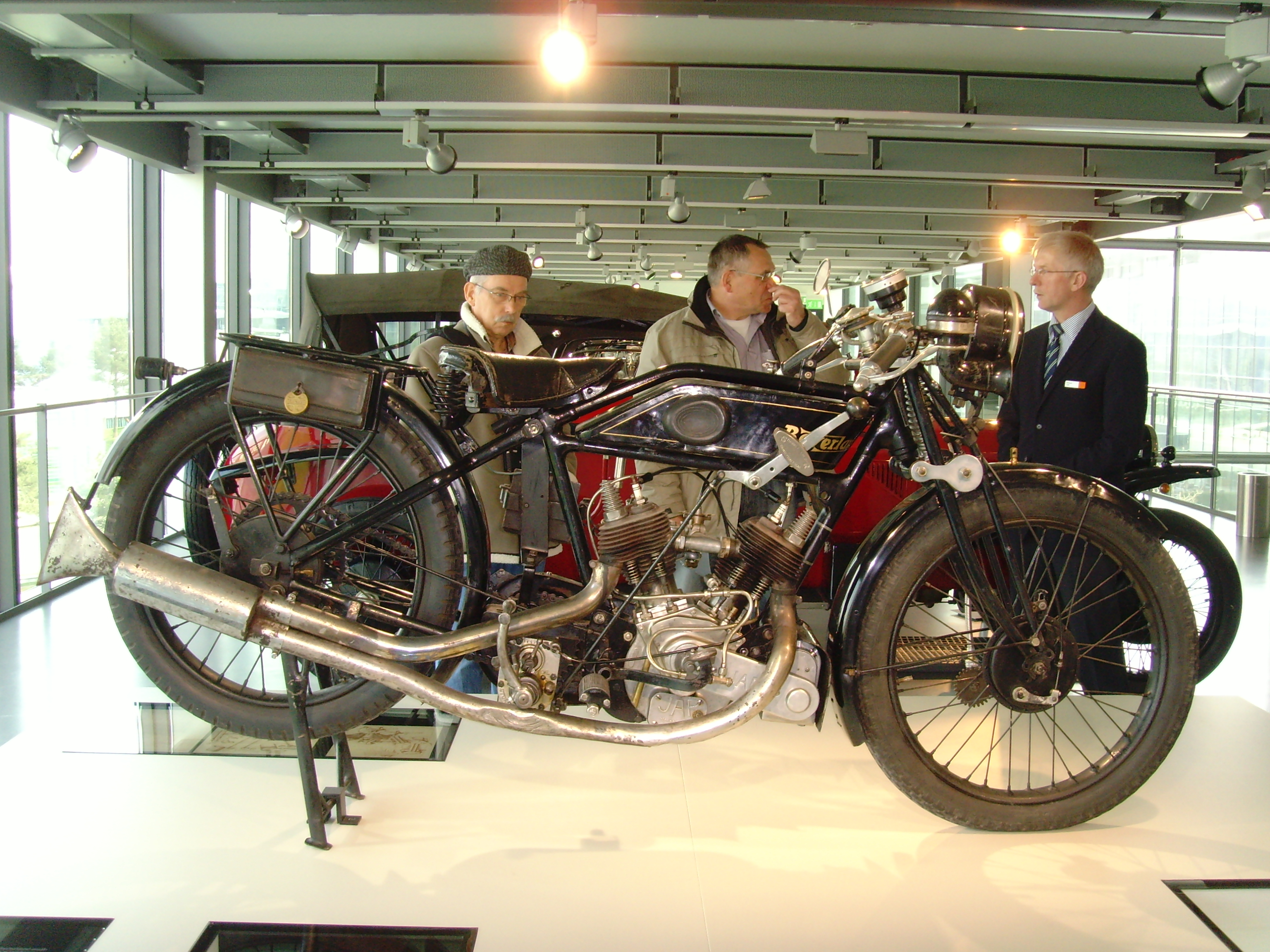 Autostadt Wolfsburg - motorrad ikonen - Bayerland 1927